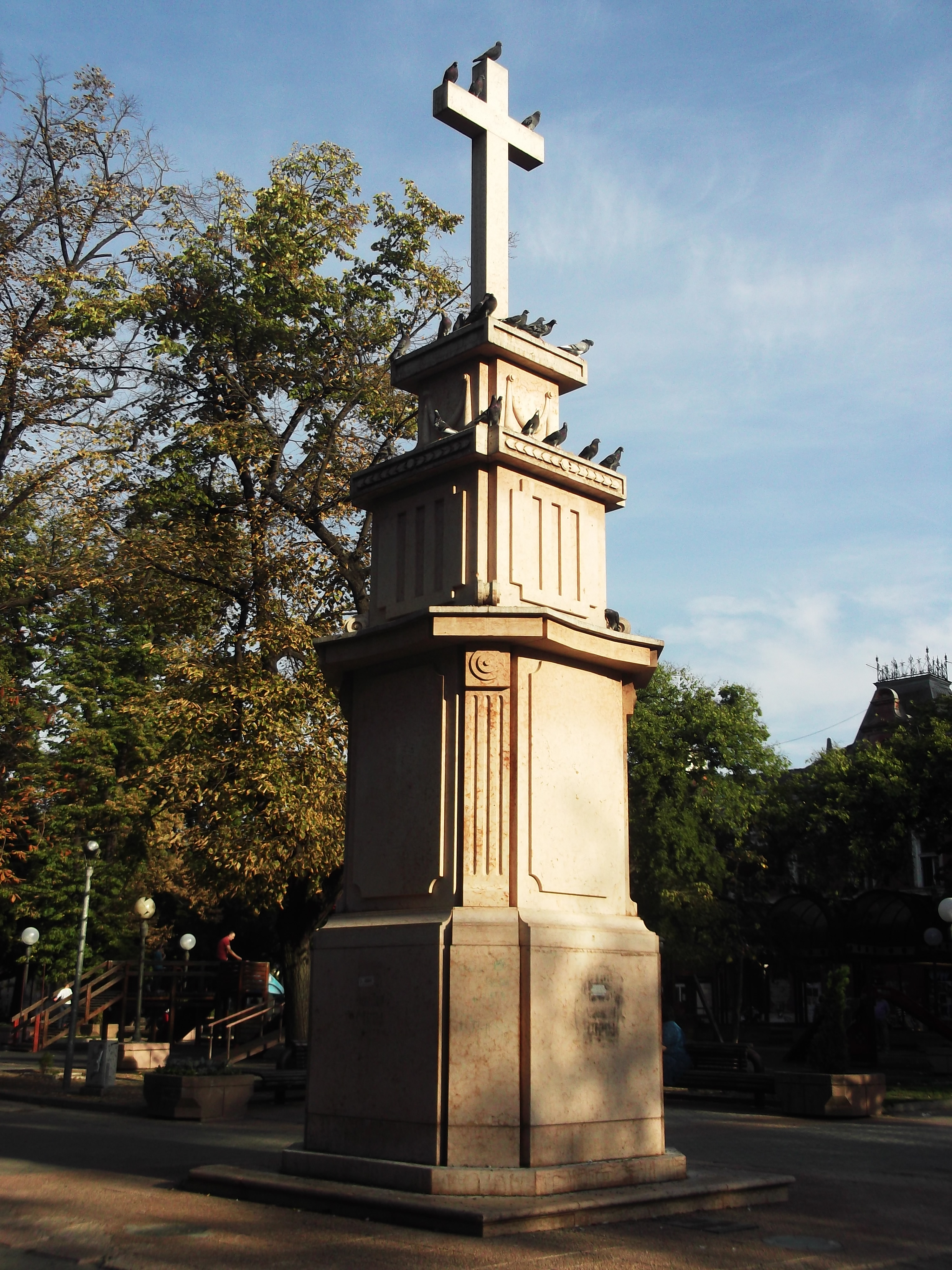 Srpski (latinica): Pravoslavni krst u gradskom parku u PančevuСрпски (ћирилица): Православни крст у градском парку у Панчеву